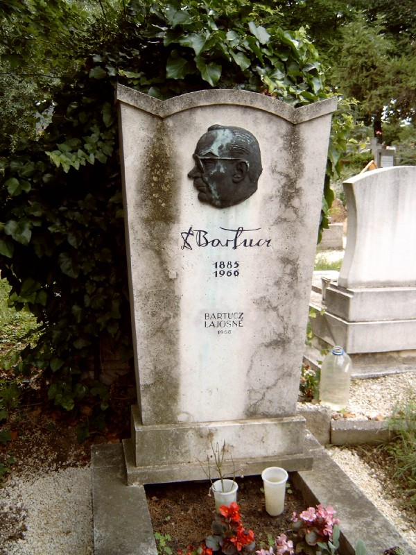 Bartucz Lajos (Szegvár, 1885. április 1. – Budapest, 1966. június 3.) antropológus, egyetemi tanár sírja Budapesten. Farkasréti temető: 5-1-363